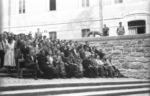 Jardunaldietan pare hartutako espeleologoak; haien artean ikus ditzakegu Manuel Laborde, Ernesto Nolte eta Joxemiel Barandiaran, besteak beste.